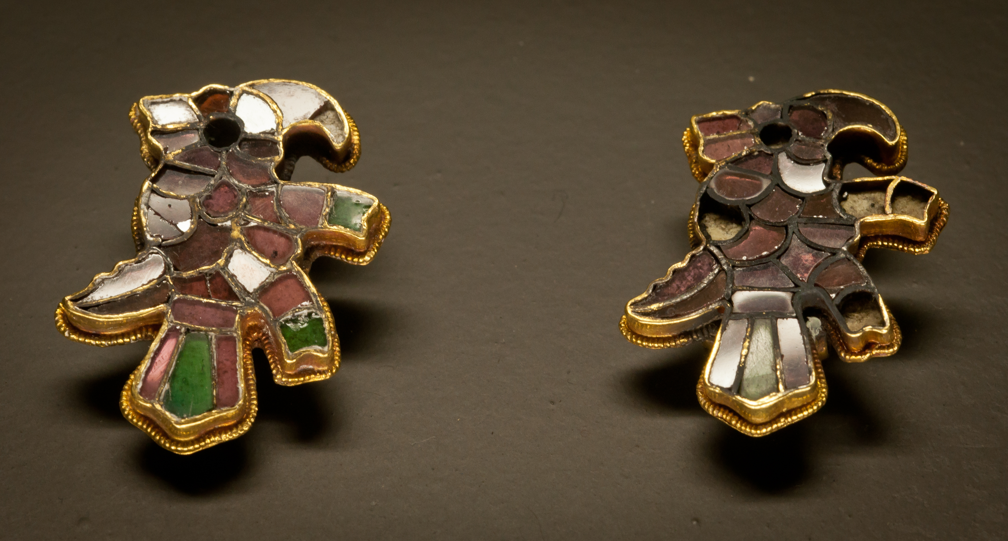 Parie de fibules à décor cloisonné en forme de rapace Or, grenat et pâte de verre. Provenance : nécropole de Saint-Denis datés de la fin du Ve siècle ou du début du VIe siècle Collections du Musée d'Archéologie Nationale